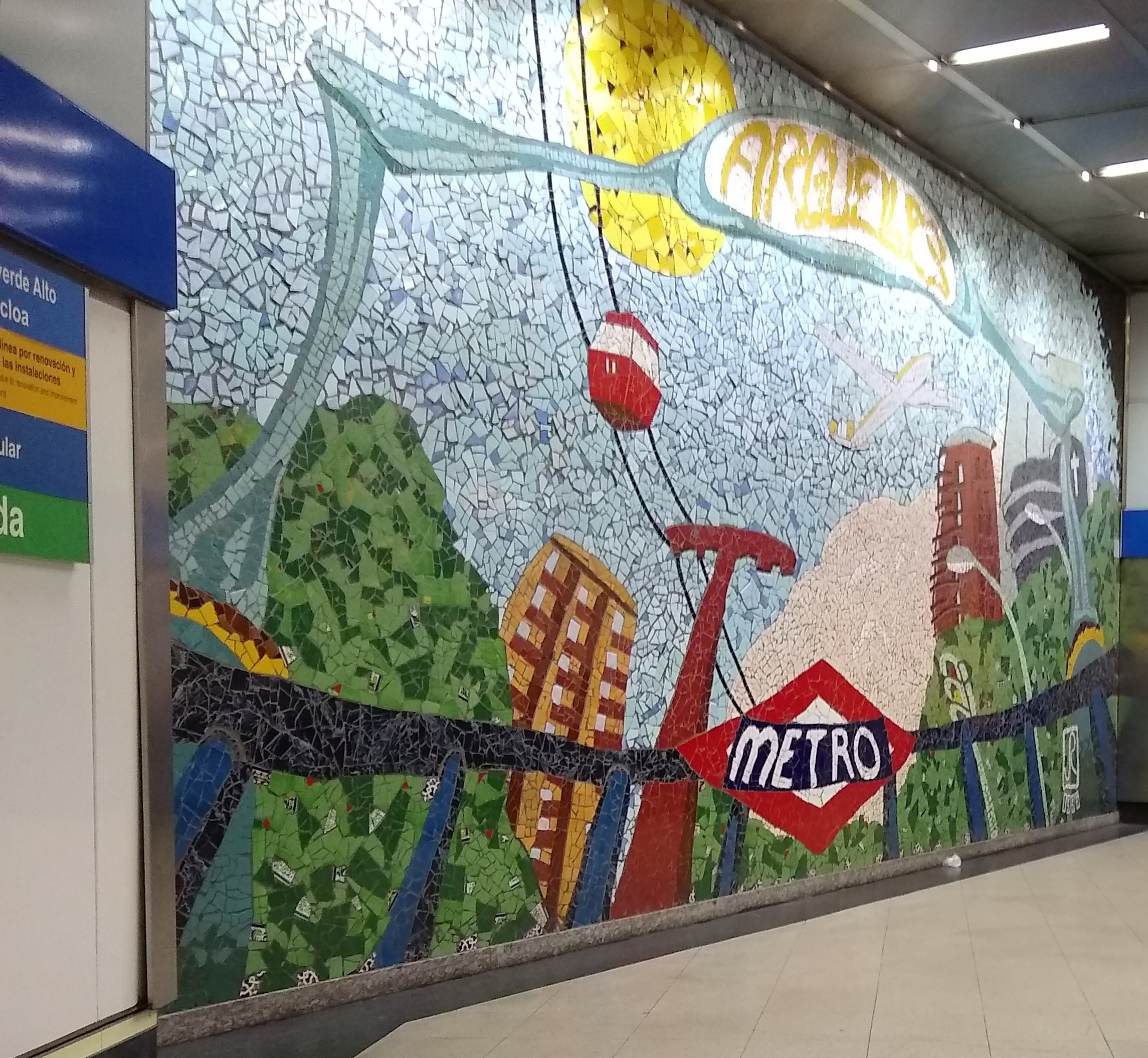 Mosaico en el vestíbulo de la estación de metro de Argüelles